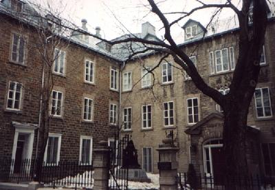 Hermanas Ursulinas de Quebec